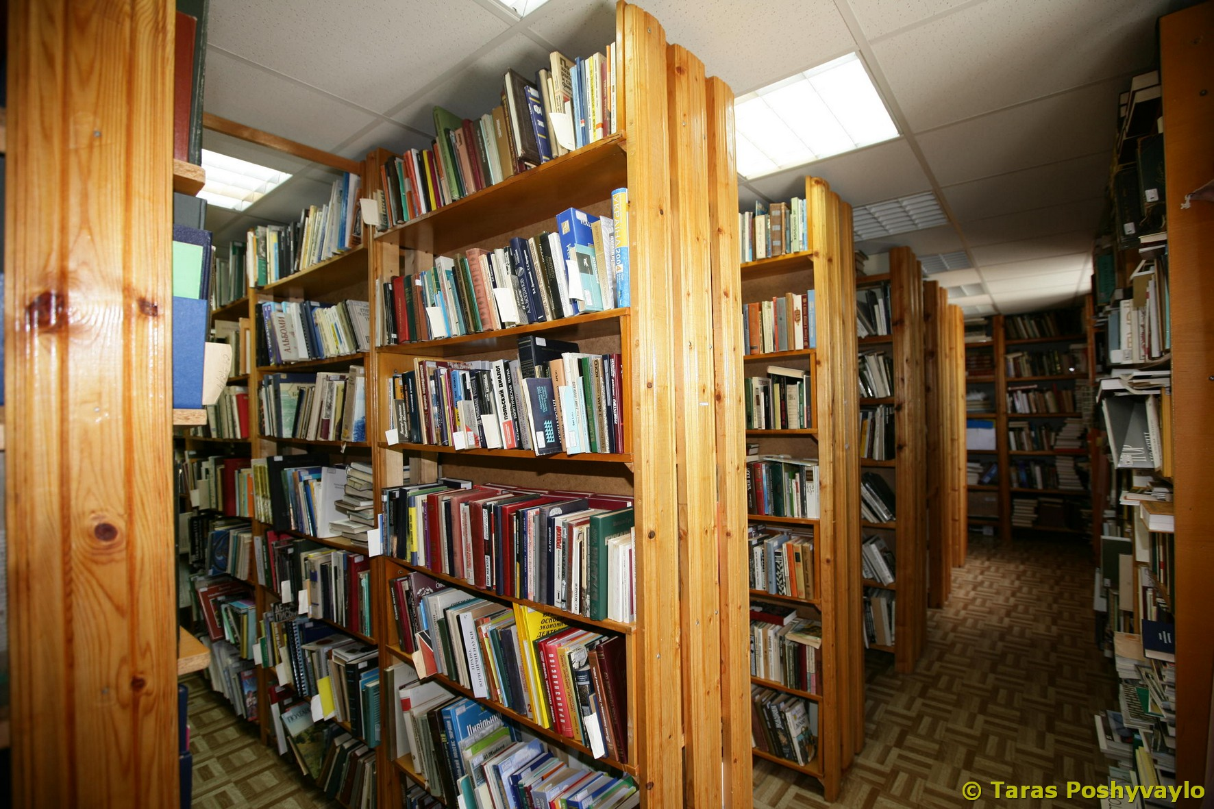 Всеукраїнська спеціалізована бібліотека з проблем українського та світового гончарства – один з підрозділів Національного музею-заповідника українського гончарства в Опішному.